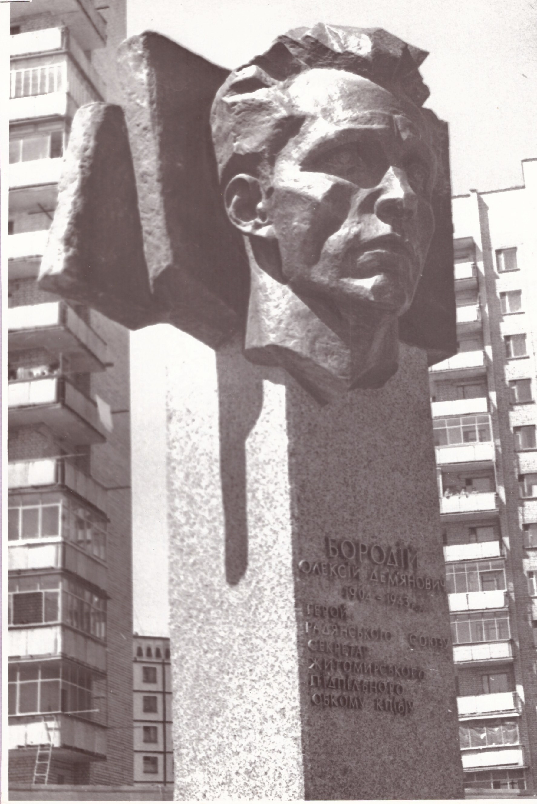 Пам’ятник Герою Радянського Союзу секретарю Житомирського підпільного обкому КП(б) України Бородію О.Д. М. Житомир Житомирська область. 1990. Скульптор Таранченко В.О., архітектор Марчук М.Г. Граніт. 400 х 137 х 125.